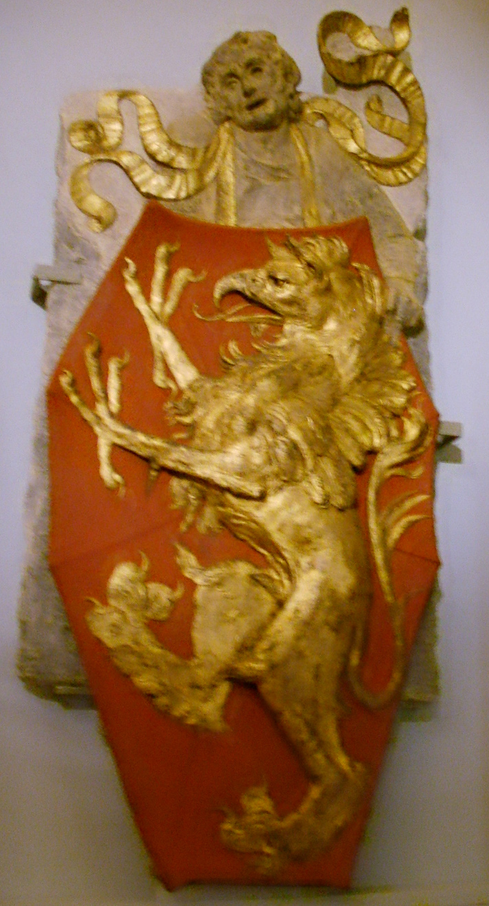 Stemma della casata fiorentina dei Martelli, opera di Donatello.